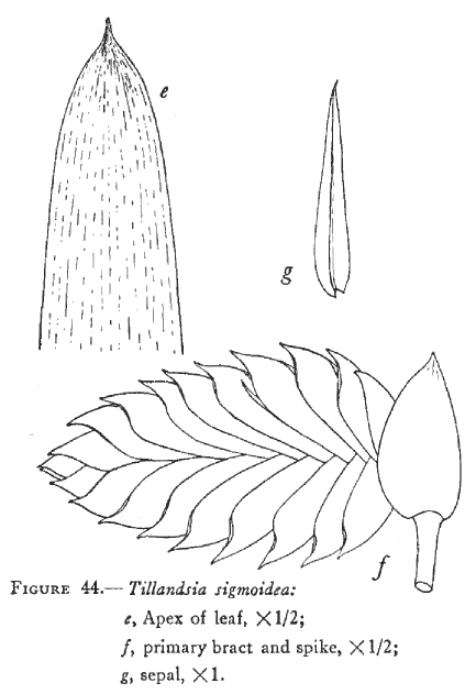 Illustration du protologue de Tillandsia sigmoidea L.B.Sm. (réorganisée)